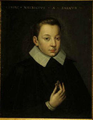 Портрет Маурицио Савойского кисти неизвестного. Около 1603 - 1605 года.